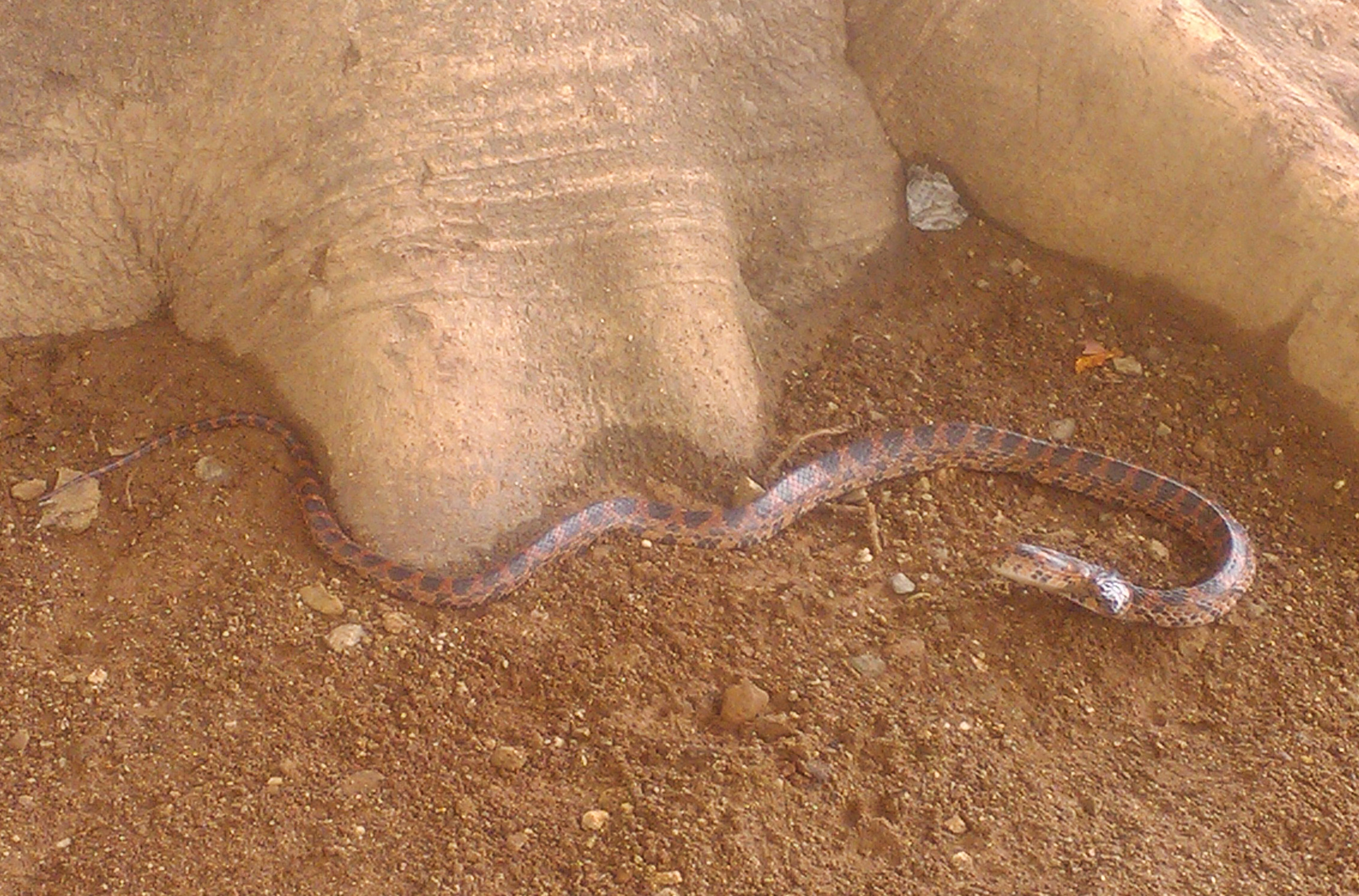 赤练蛇，拍摄于中国云南省宾川县金牛镇第二初级中学校园内。